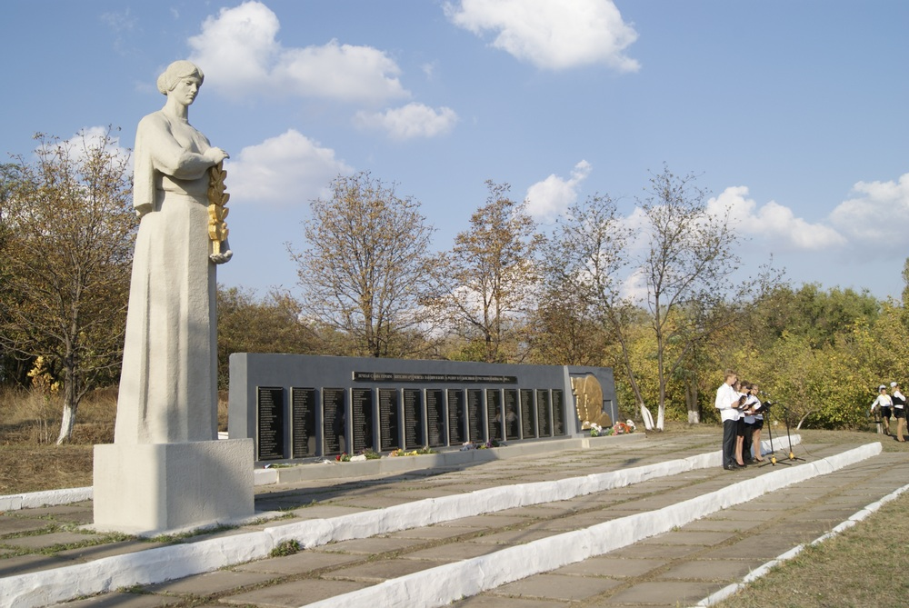 Памятники Артемовска